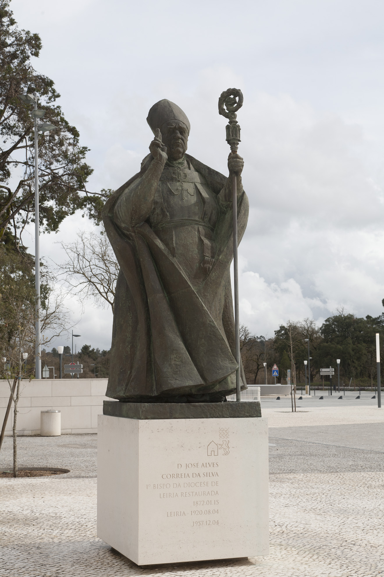 Joaquim Correia, D. José Alves Correia da Silva, 1972, bronze, Fátima